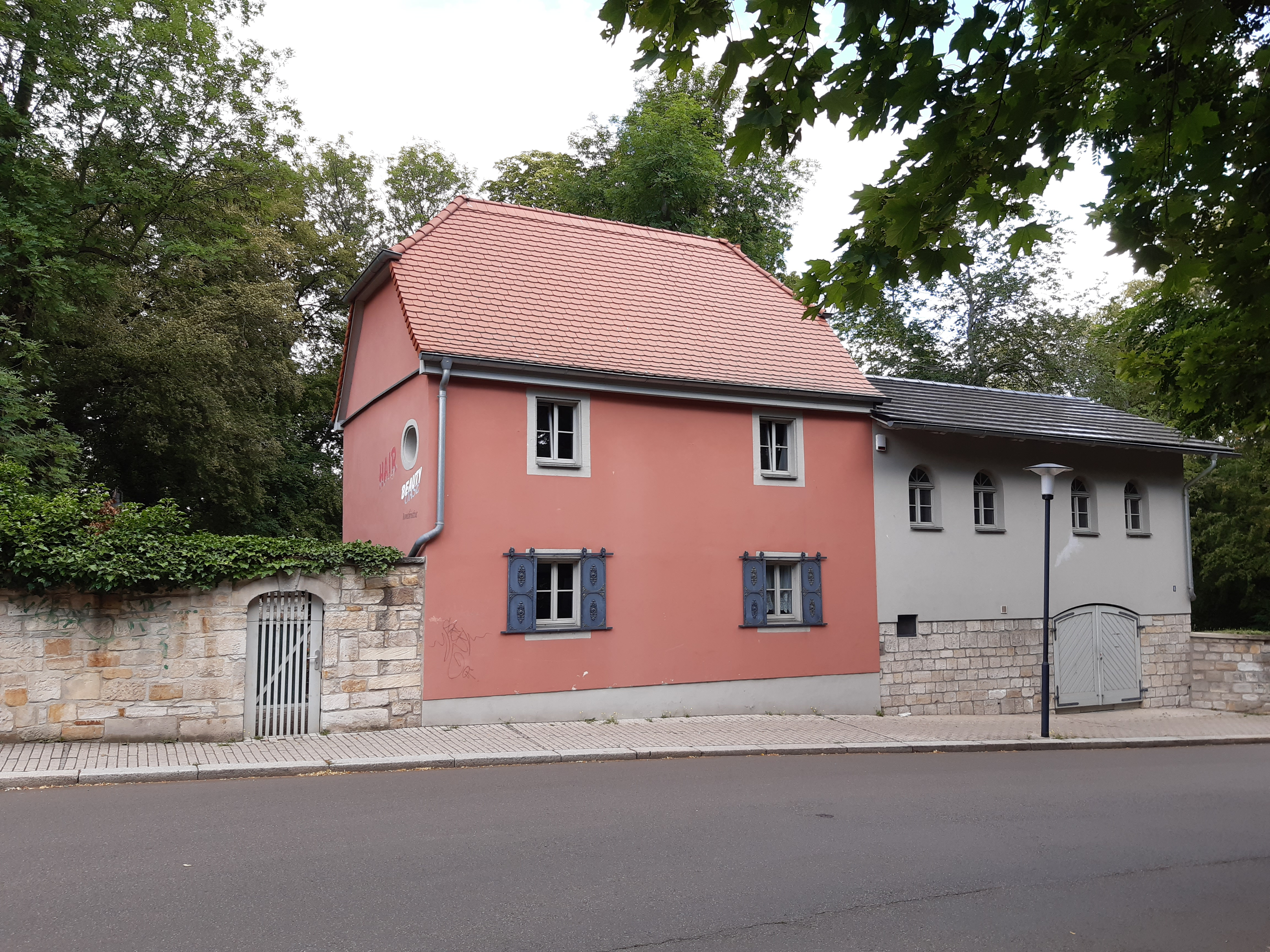 Weißenfels, Am Sausenhölzchen 5